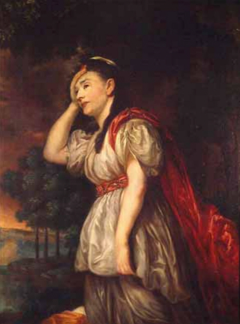 Rollenportrait Esther Charlotte Brandes (1742–1786) als "Ariadne" im gleichnamigen Stück (Benda/Brandes), 18./19. Jahrhundert, Öl auf Leinwand, 124 x 94 cm Inv.Nr. 31781 (Sammlung Niessen) Theaterwissenschaftliche Sammlung der Universität zu Köln, Schloss Wahn